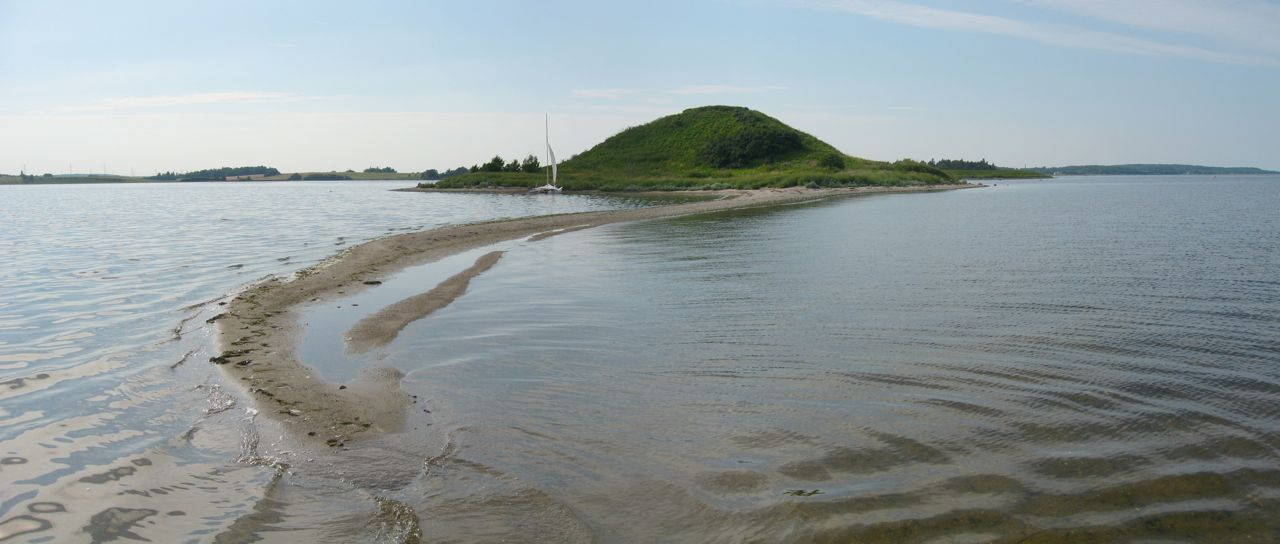 Kølholm i Roskilde Fjord